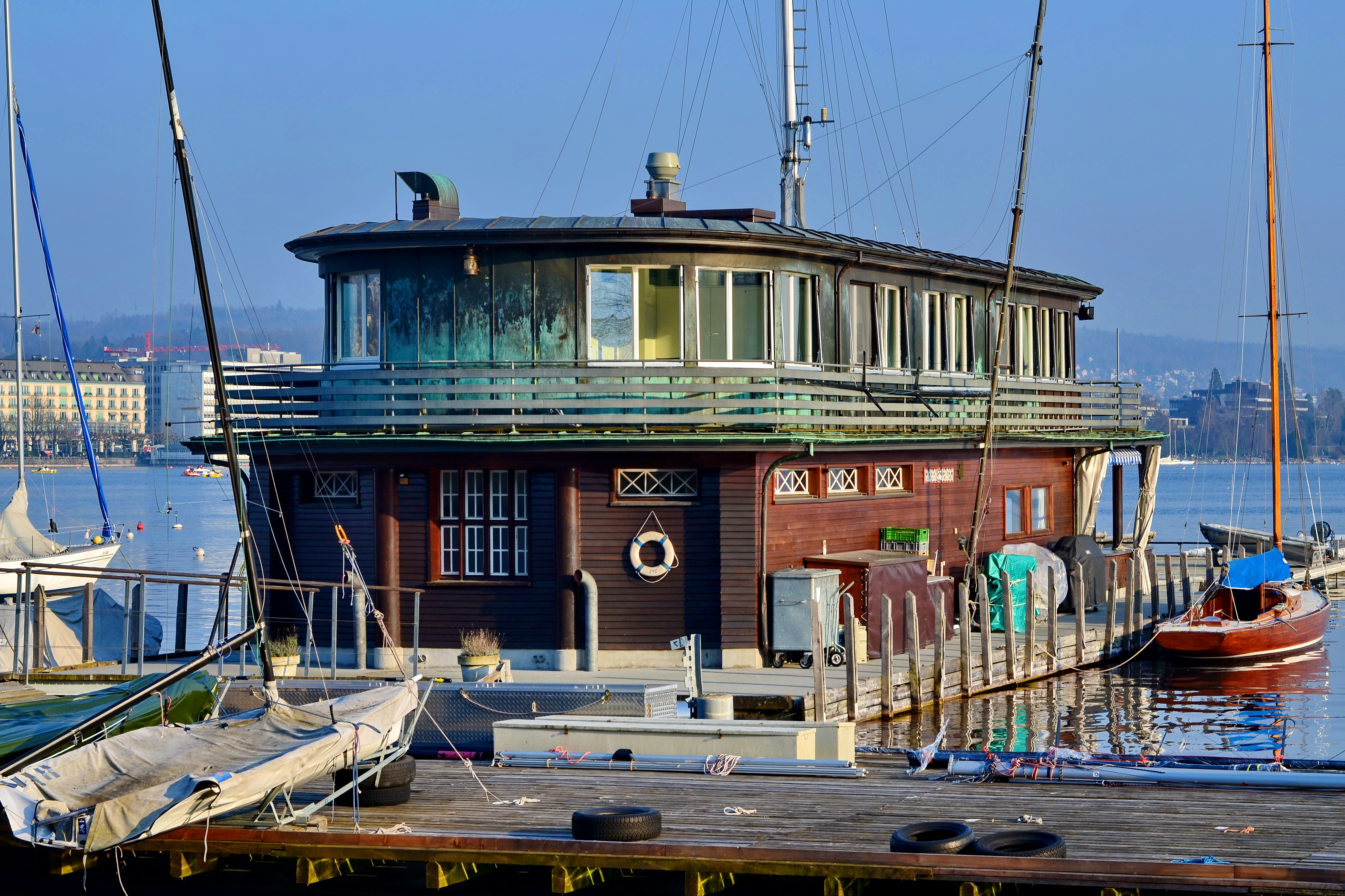 Clubhaus, General-Guisan-Quai in Zürich-Enge (Switzerland)